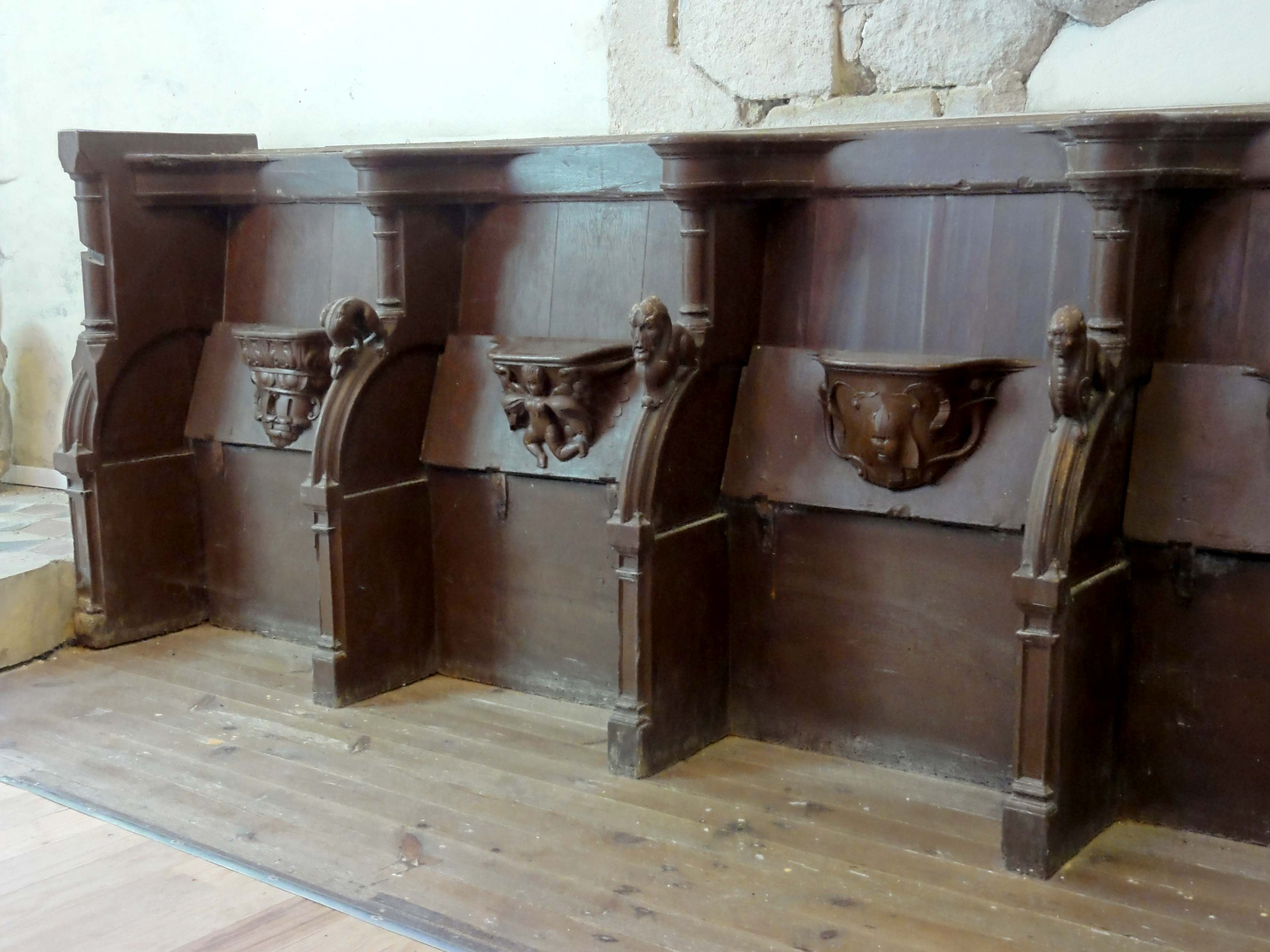 Stalles du XVIe siècle, remontées au XIXe siècle.